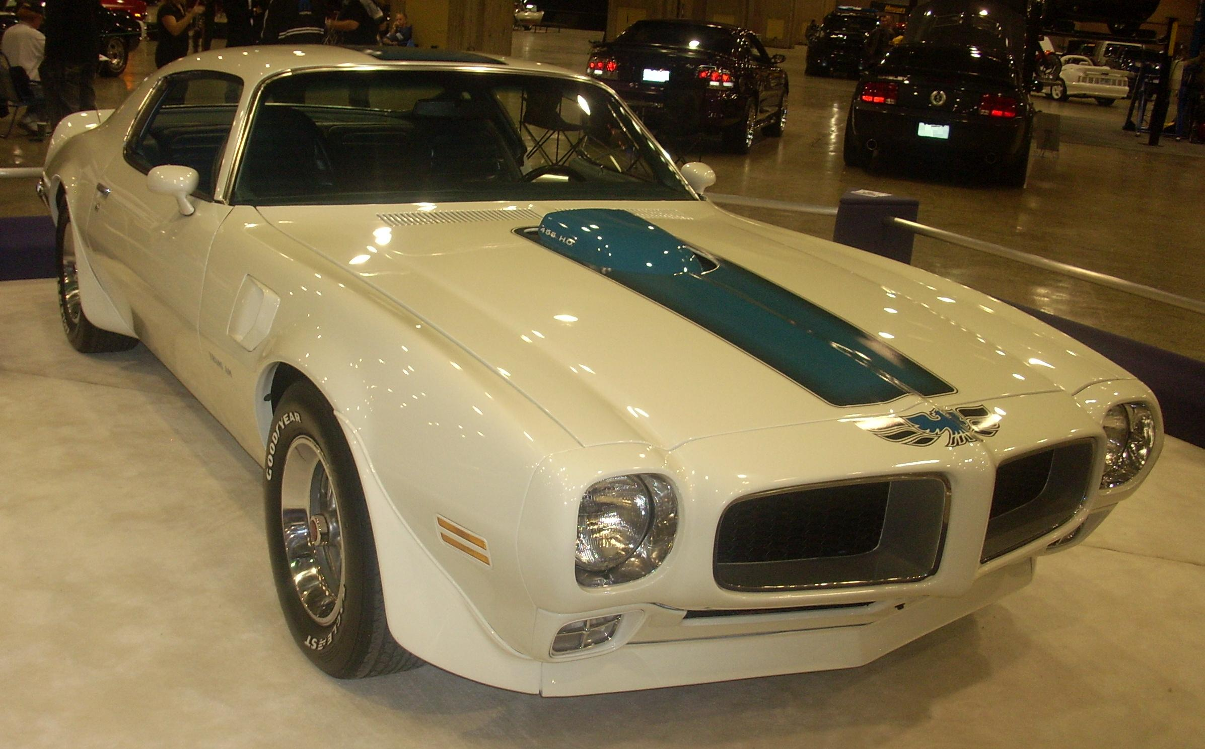 1972 Pontiac Trans Am photographed at Auto classique Montréal 2008.